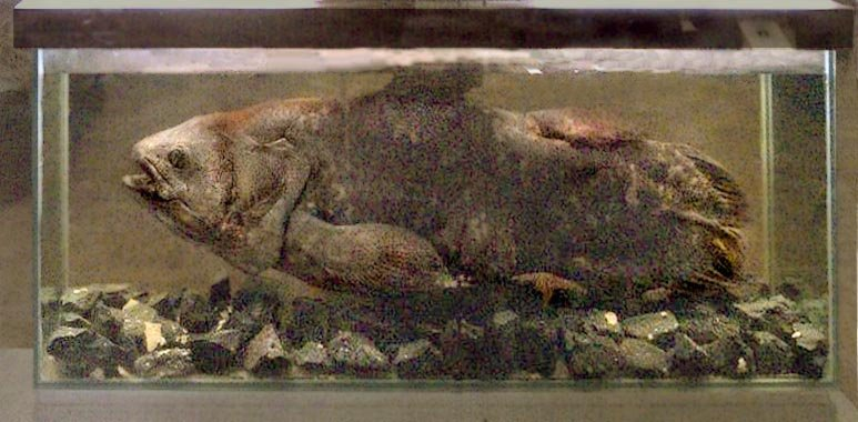 Coelanthen zijkant. Op verzoek van Gebruiker:MADe lichter gemaakt. Met Wikipedia watermerk. Ed Stevenhagen. Opmerken dat deze afbeelding verouderd is (in het KMMA werd de visbokaal "ververst", wat dringend nodig was) Categorie:Afbeelding vis